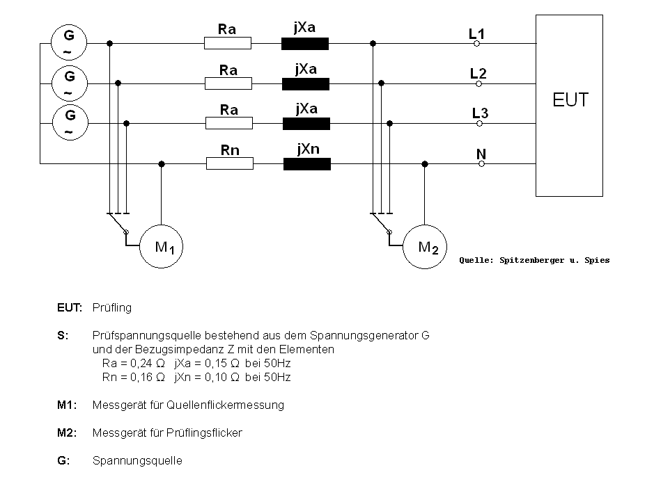 Schaltplan Flickermessung